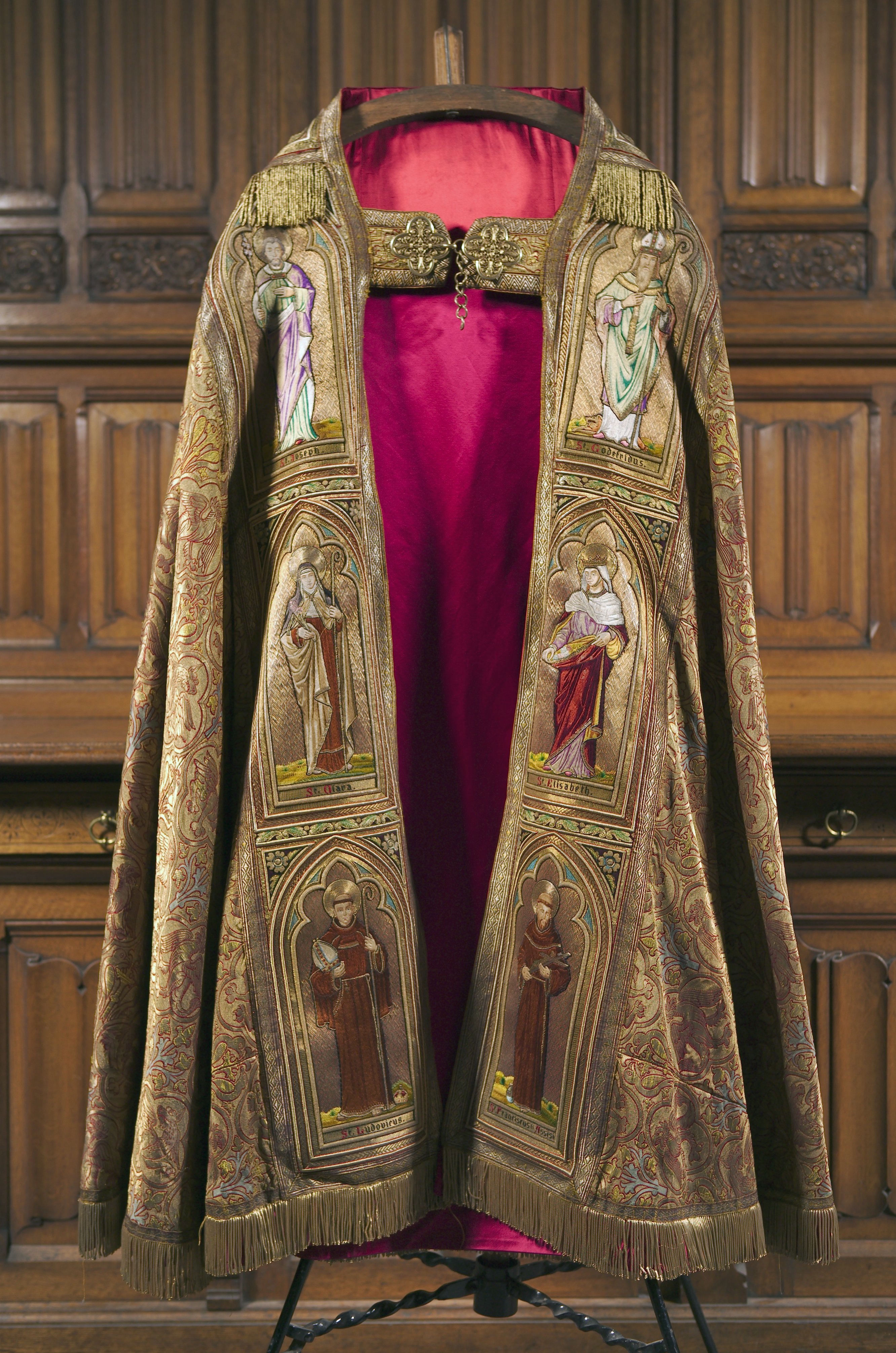 Pastorie van de Rooms-katholieke Maria van Jessekerk: Interieur, koorkap, goudbrokaat. Geleverd door het atelier Van Severen-Ente, Sint-Niklaas, België, 1896. (opmerking: Publicatie 400 jaar kerken in 'De Papenhoek' foto gebruikt voor boek, pagina 144)